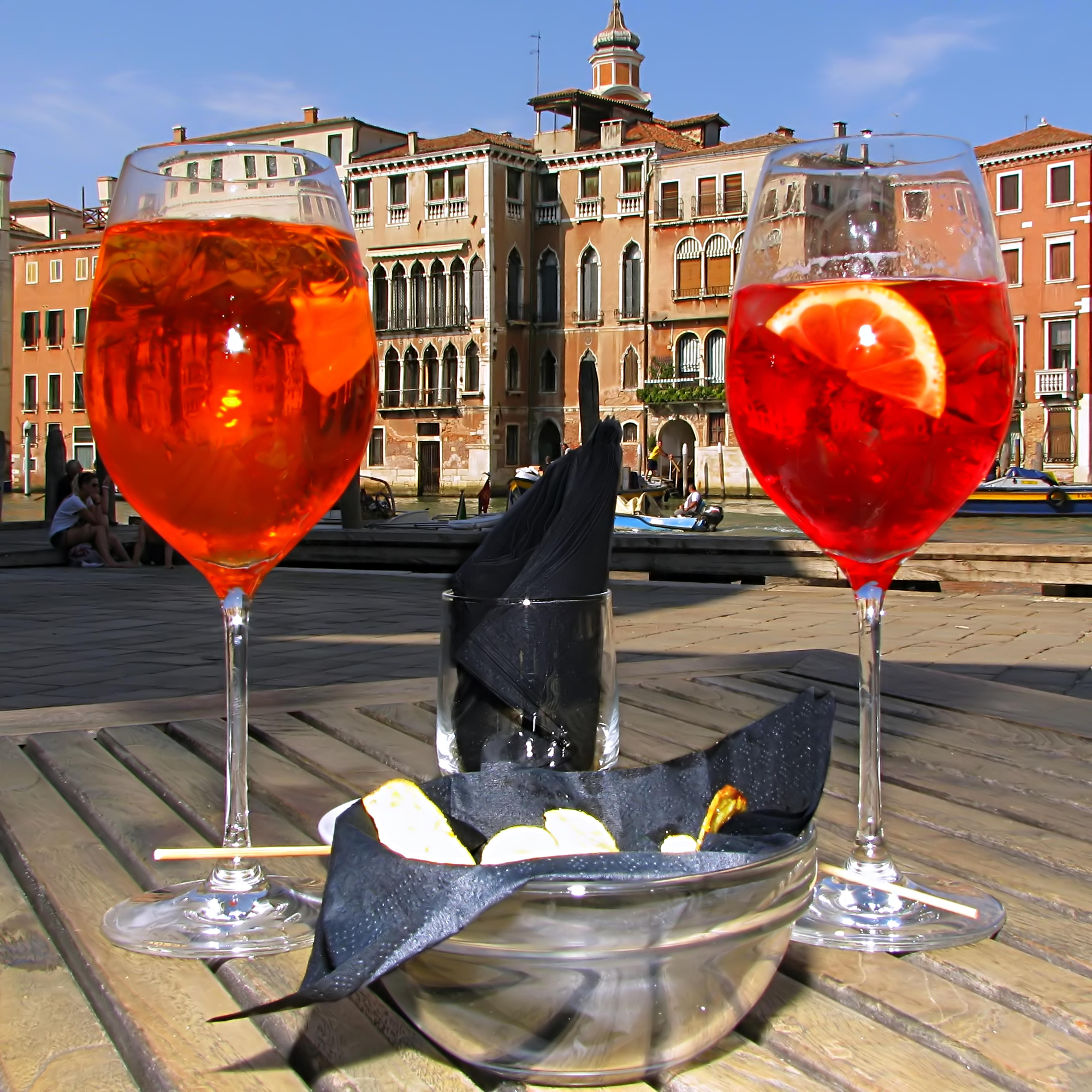 Aperol Spritz (li.) und Campari Spritz (re.). Osteria Al Pesador an der Erberia in Venedig.